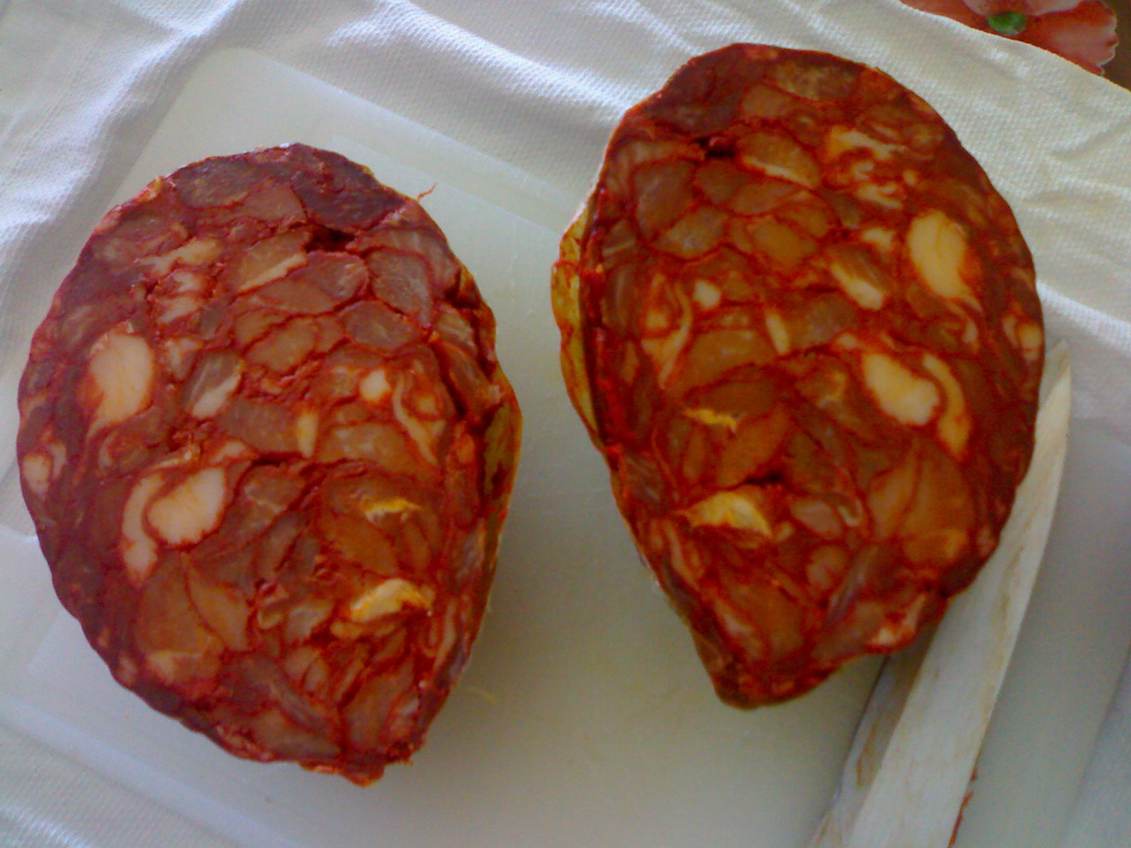 ventricina vastese (precisamente di Palmoli) tagliata a metà dove è possibile vedere le polpe di carne di cui è composta. Il colore rosso è dato dal pepe.